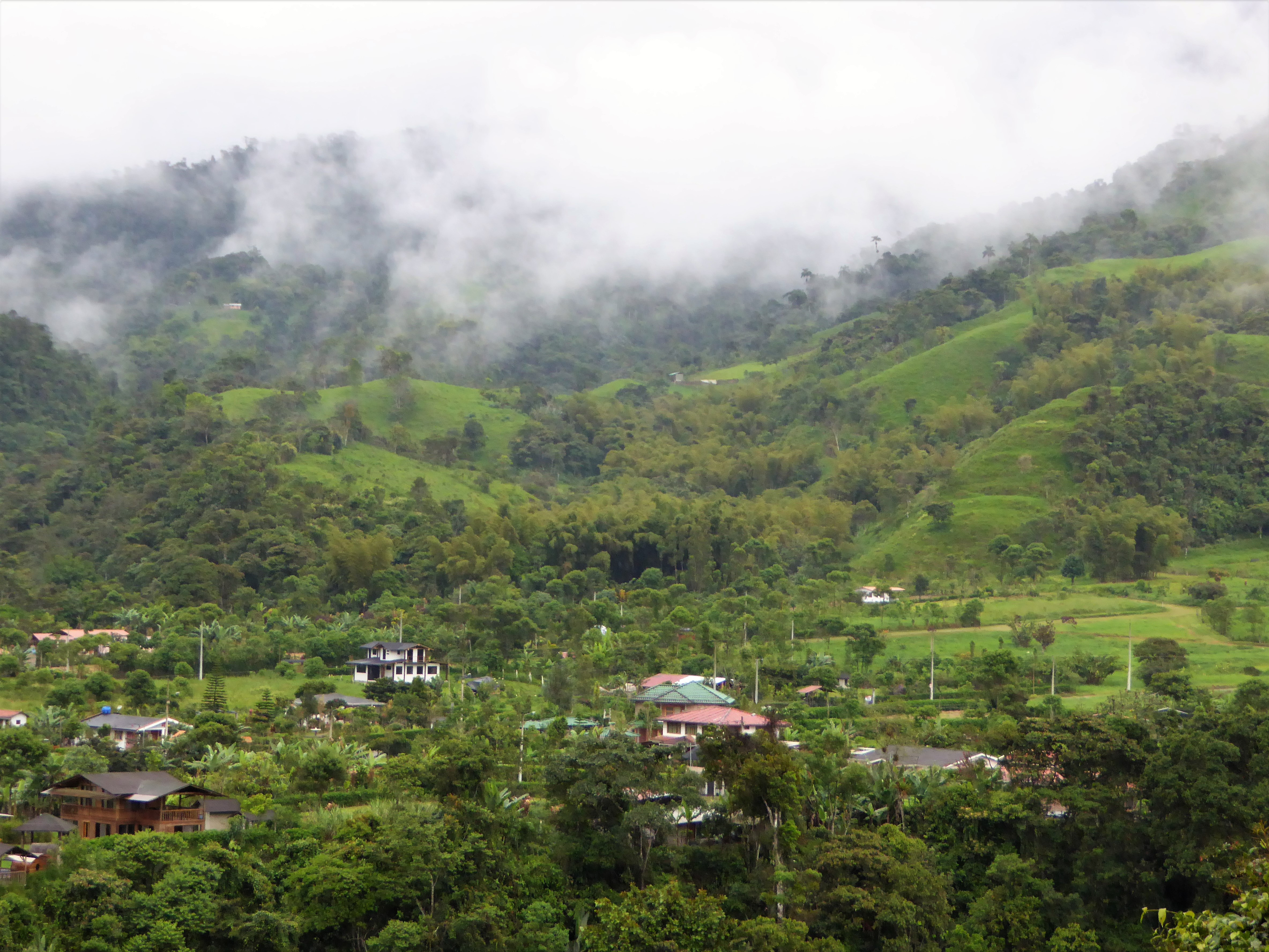 Blick vom Terra Bambu Hotel in Tal und Nebelwald